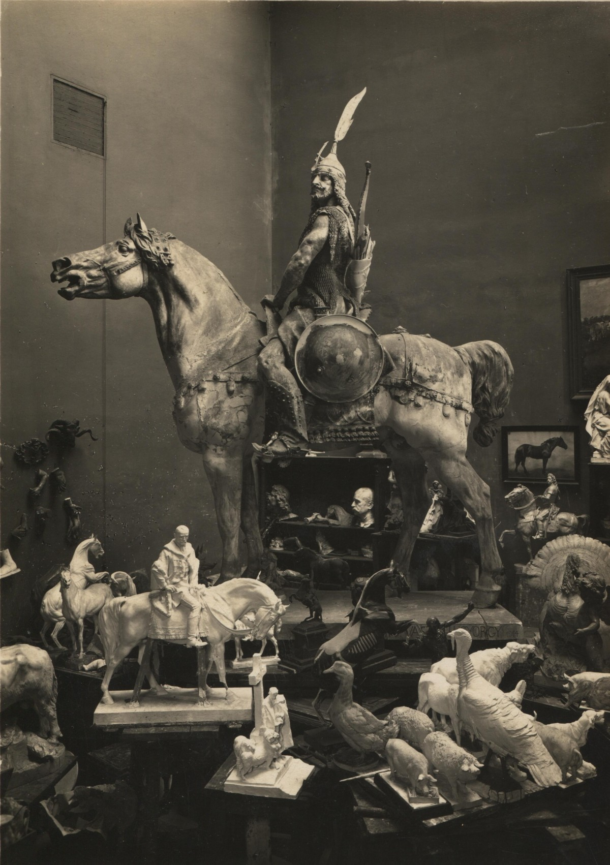 Felvétel ifj. Vastagh György műtermének részletéről az Árpád szoborral